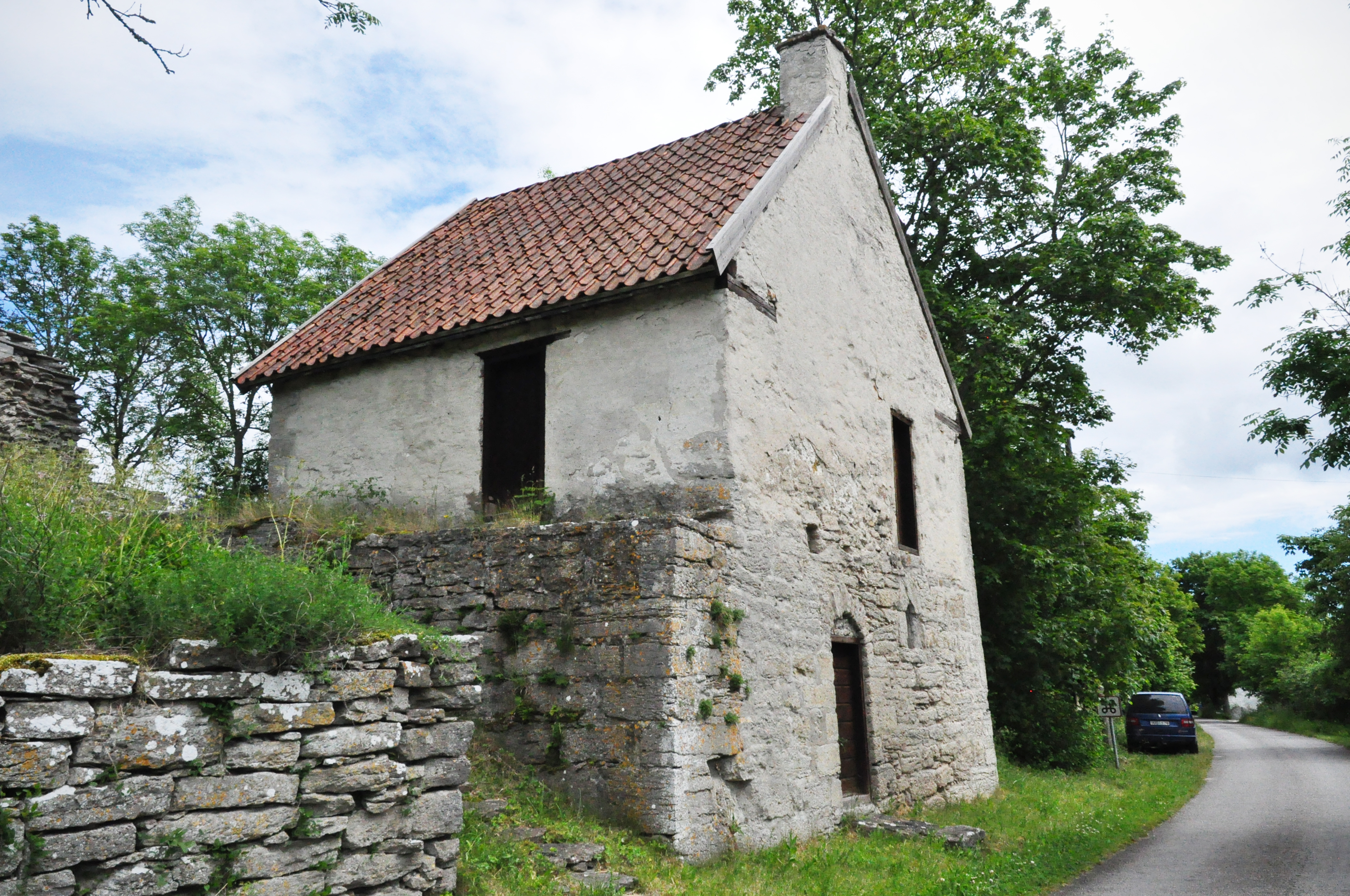 Det så kallade Fardume slott är en ruin efter ett medeltida stenhus i Fardume i Rute socken, vid Fardume träsk på Gotland. Den här byggnaden brukar kallas för Sören Norrbys källare.